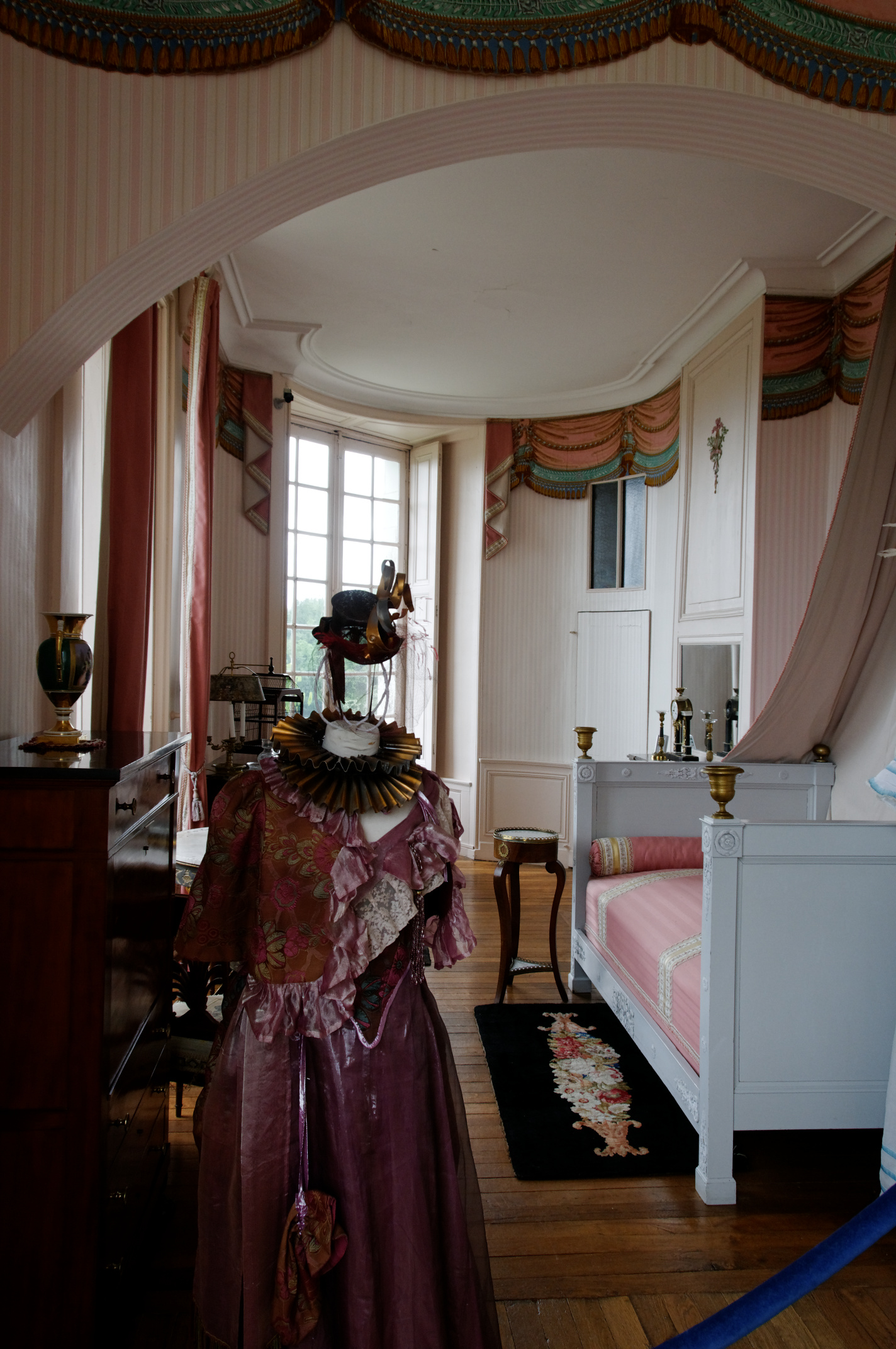 Chambre de Madame de Staël, Château de Valençay, Valençay, Indre, France